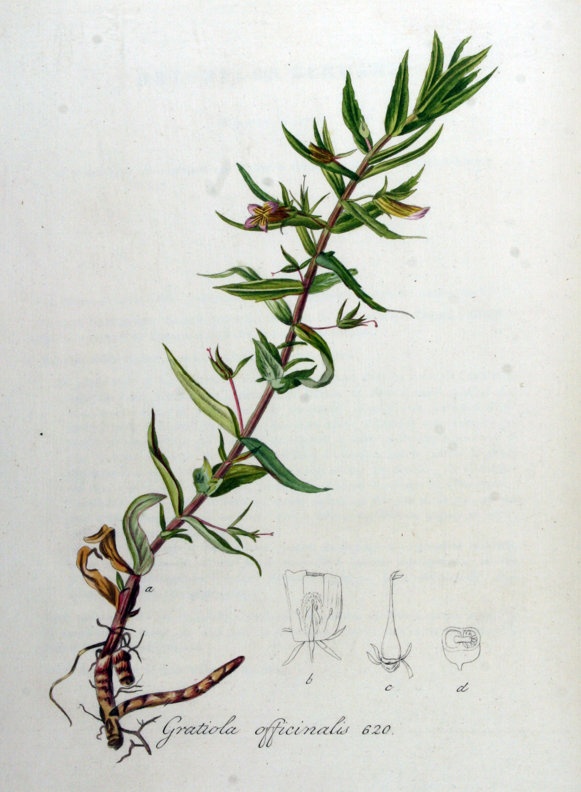 Gratiola officinalis L.